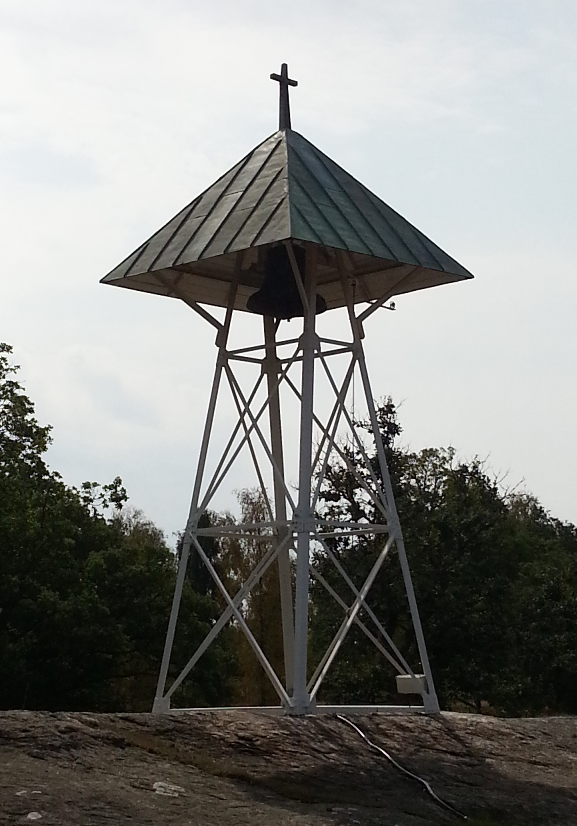 Klockstapel nära kyrkogården på Stora Askerön